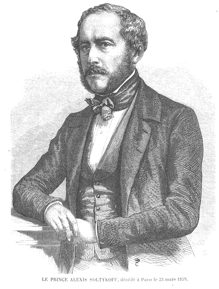 Портрет Алексея Дмитриевича Салтыкова